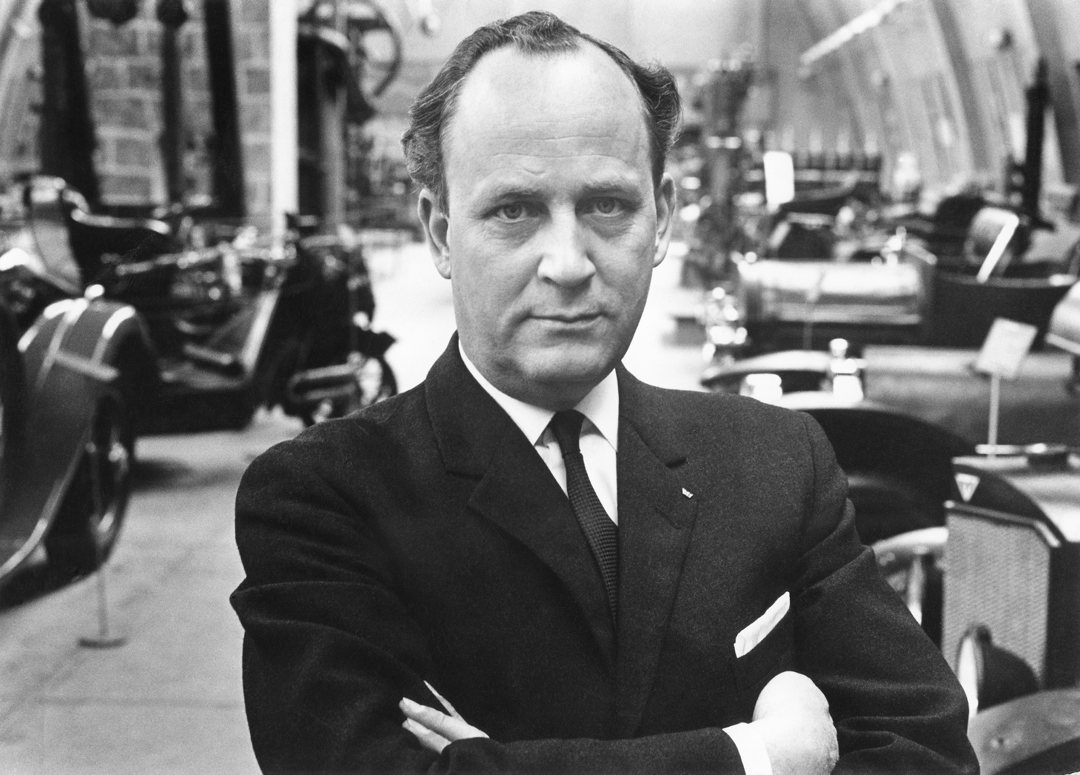 Museidirektör Sigvard Strandh.